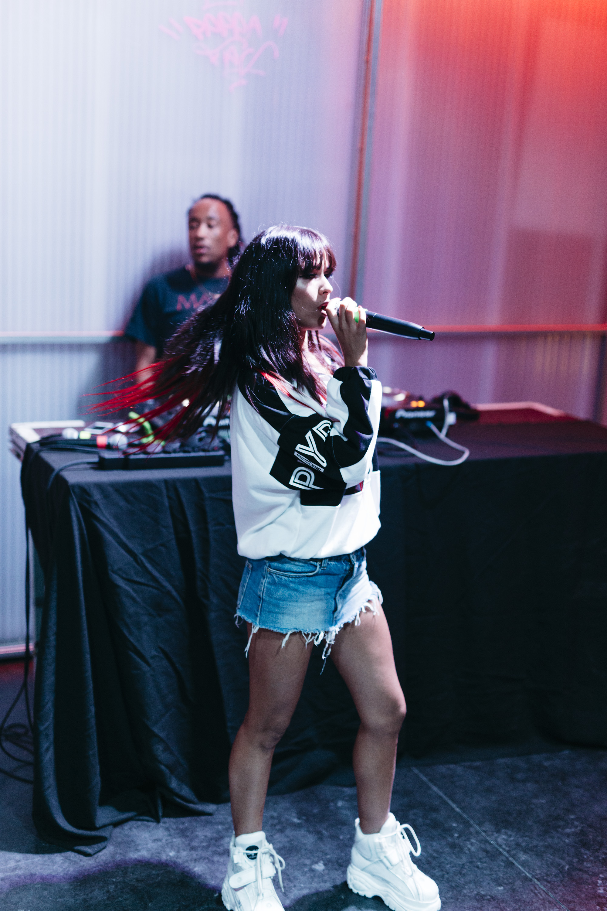 Artista: La Zowi Autora: Alba Ruperez para El Bloque TV Detalles: Sala Apolo, Barcelona. Noviembre 2018